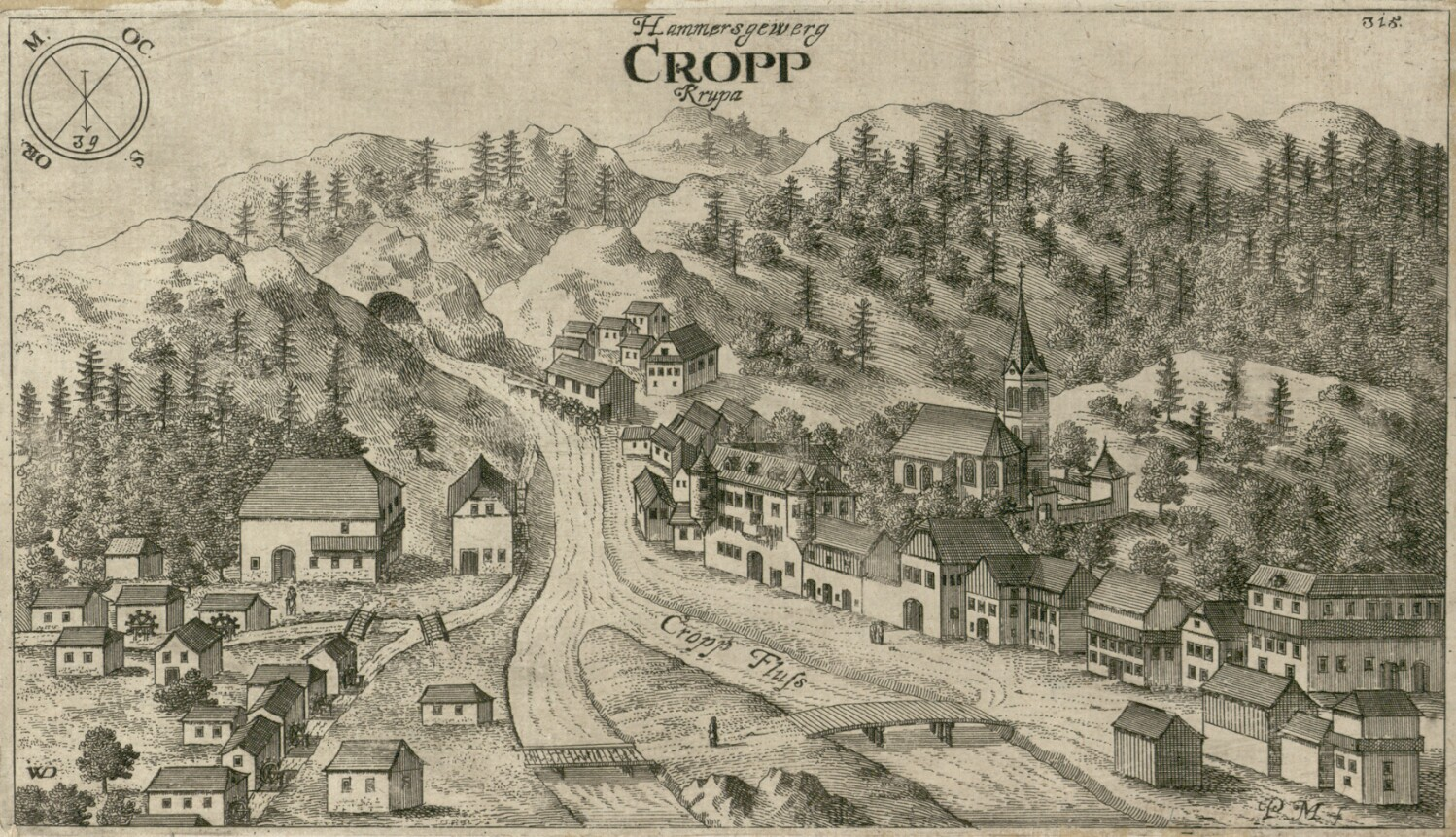 Kropa